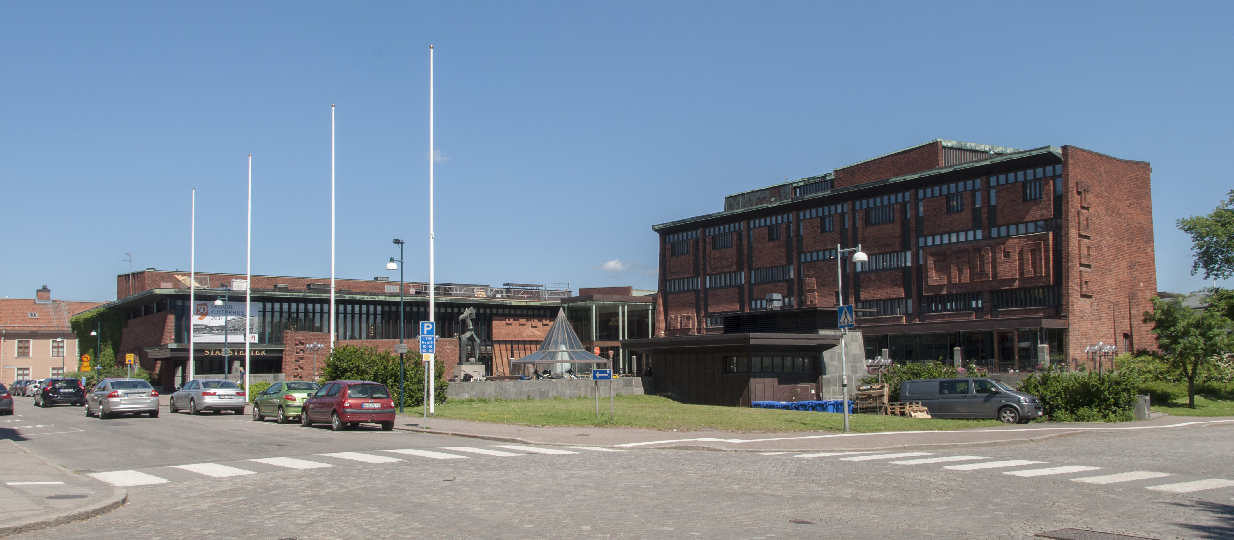 Skövde Kulturhus. Byggt 1964 och är ritat av arkitekten Hans-Erland Heineman